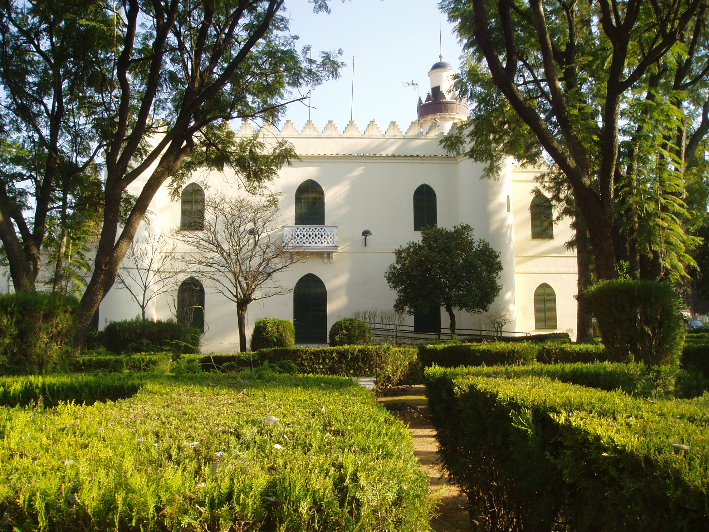 Alquería del Pilar, casa de recreo del siglo XIX actualmente integrada en el parque que lleva su nombre. Dos Hermanas (Sevilla) España